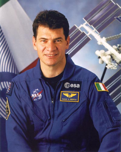 Paolo Angelo Nespoli (April 6, 1957) is an Italian astronaut.